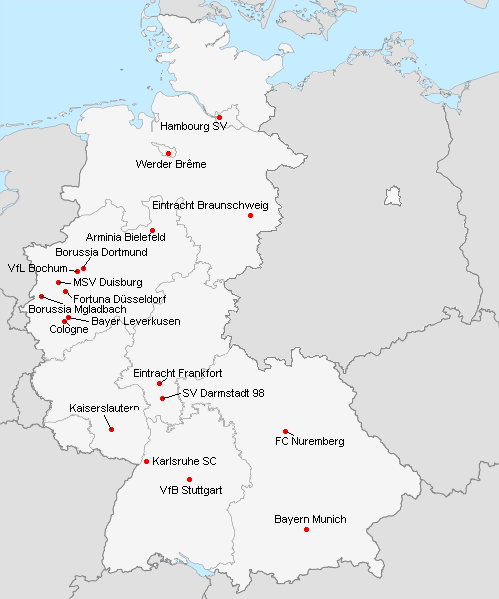 Répartition des clubs en 1.Bundesliga 1981-1982.